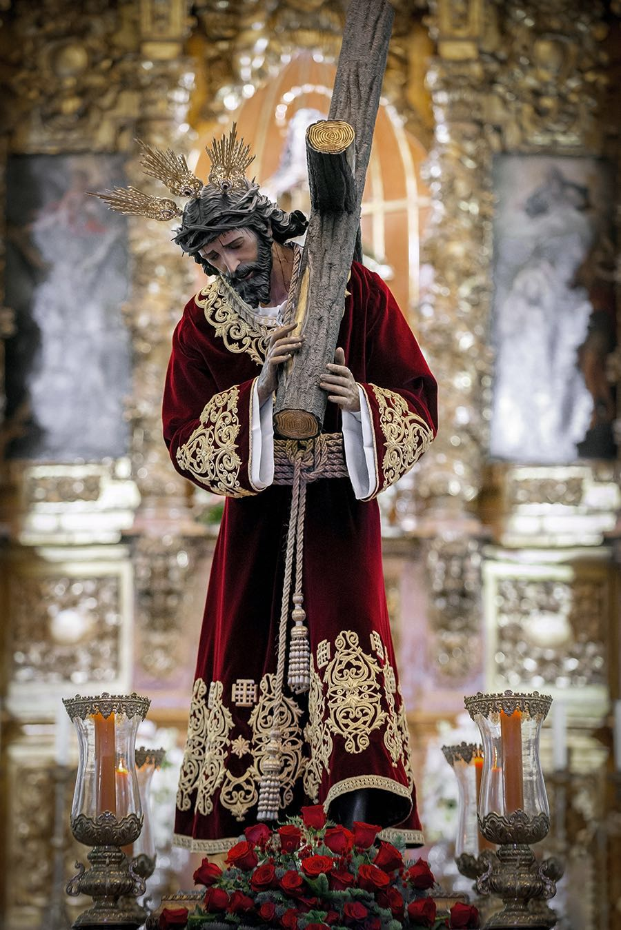 Jesús del Gran Poder con la túnica mudéjar estrenada en 2015 (Fotografía: Jesús Asencio).